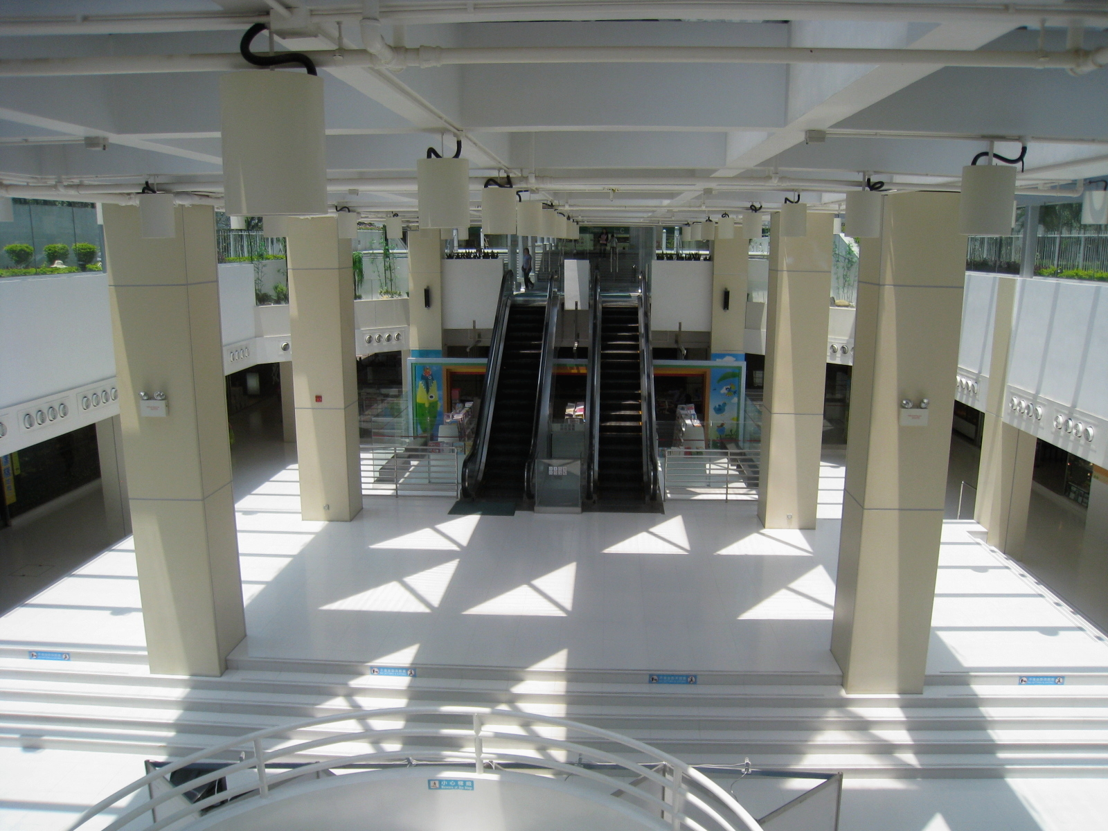 Tai Po Mega Mall Zone D Void 大埔超級城 D 區